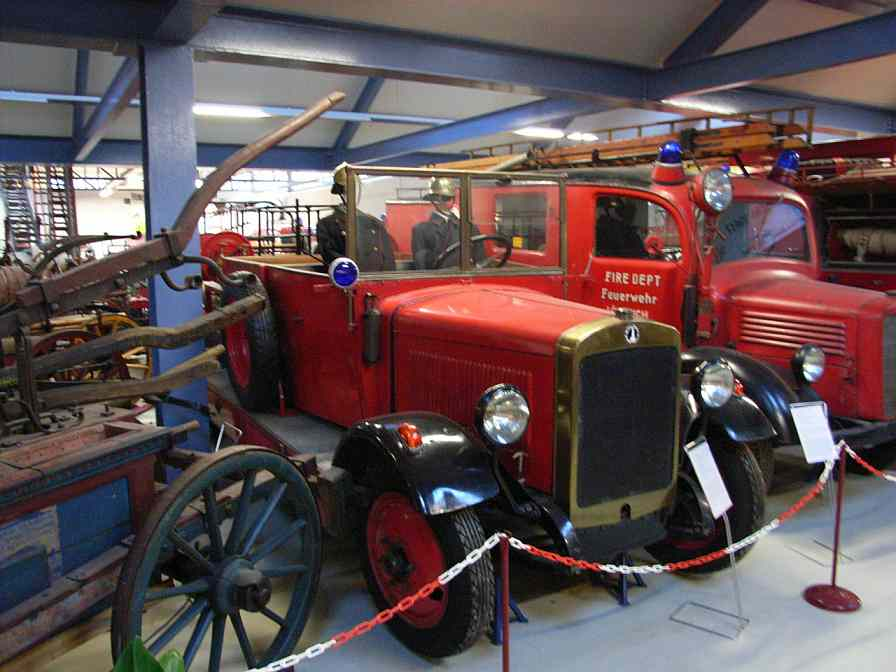 Rheinisches Feuerwehrmuseum Erkelenz-Lövenich